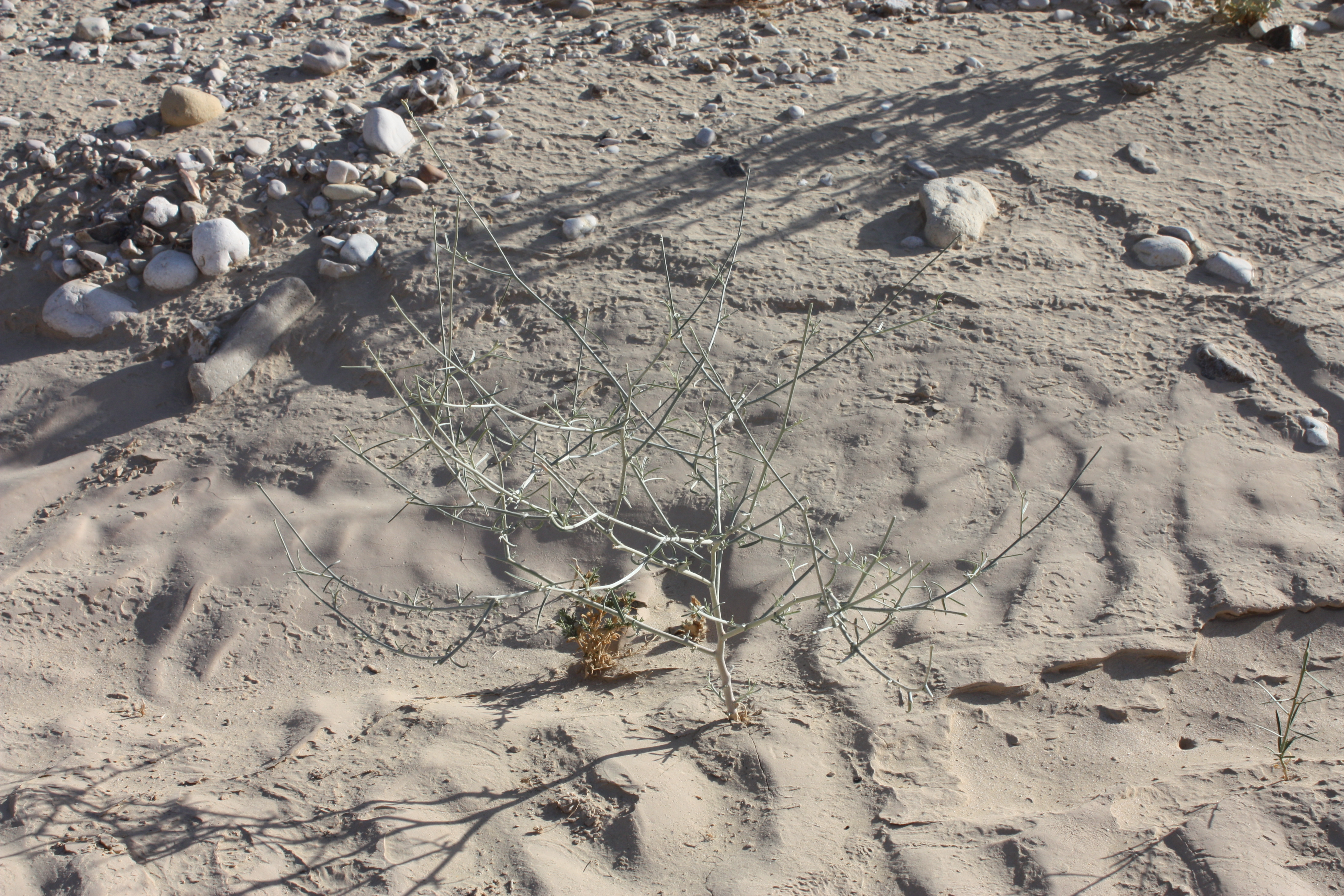 פרסטיה מצרית נוף